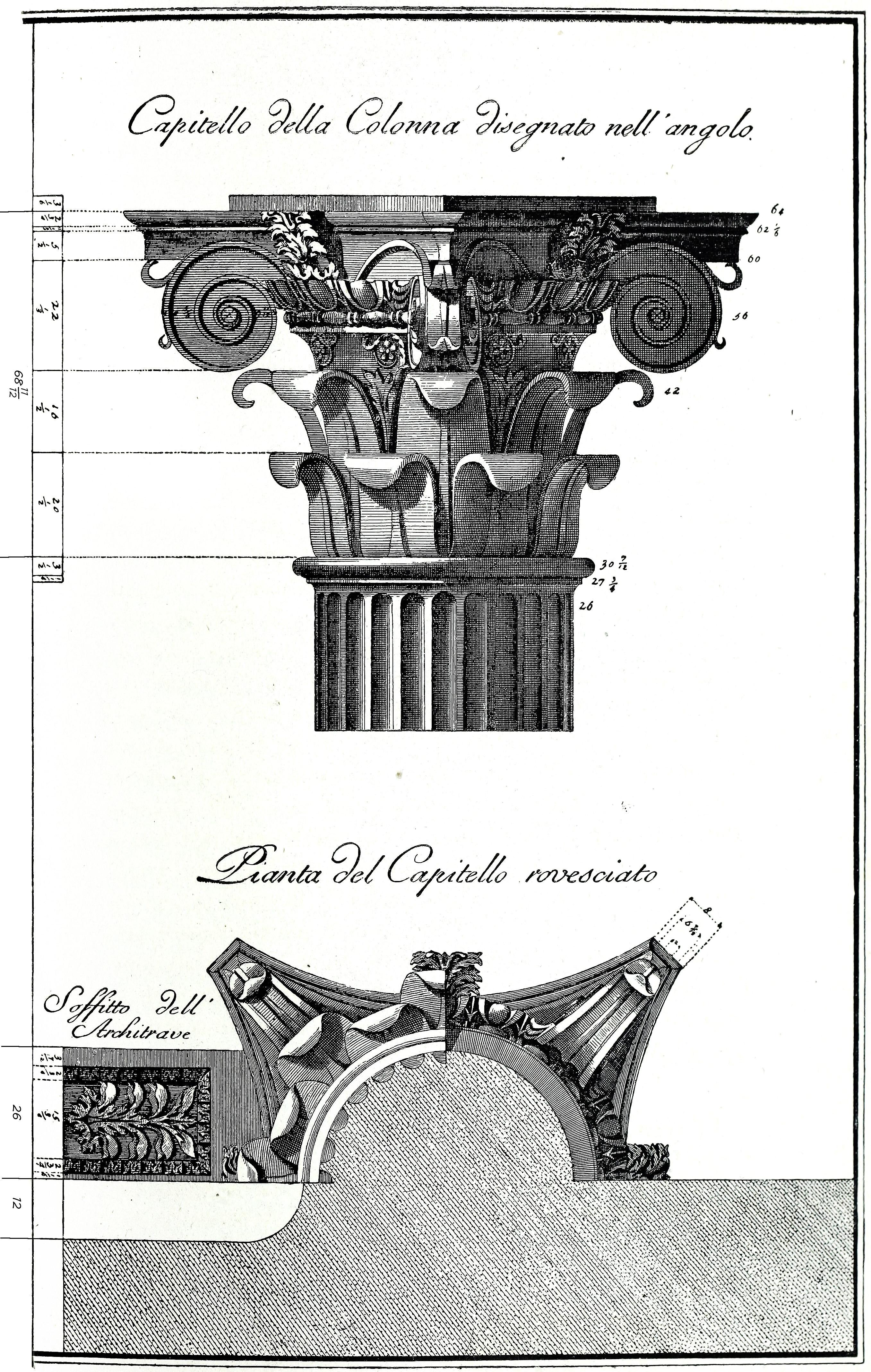 Illustrazioni da I monumenti e le opere d'arte della città di Benevento: lavoro storico, artistico, critico, di Almerico Meomartini, Tipografia di L. de Martini e figlio, Benevento, 1889